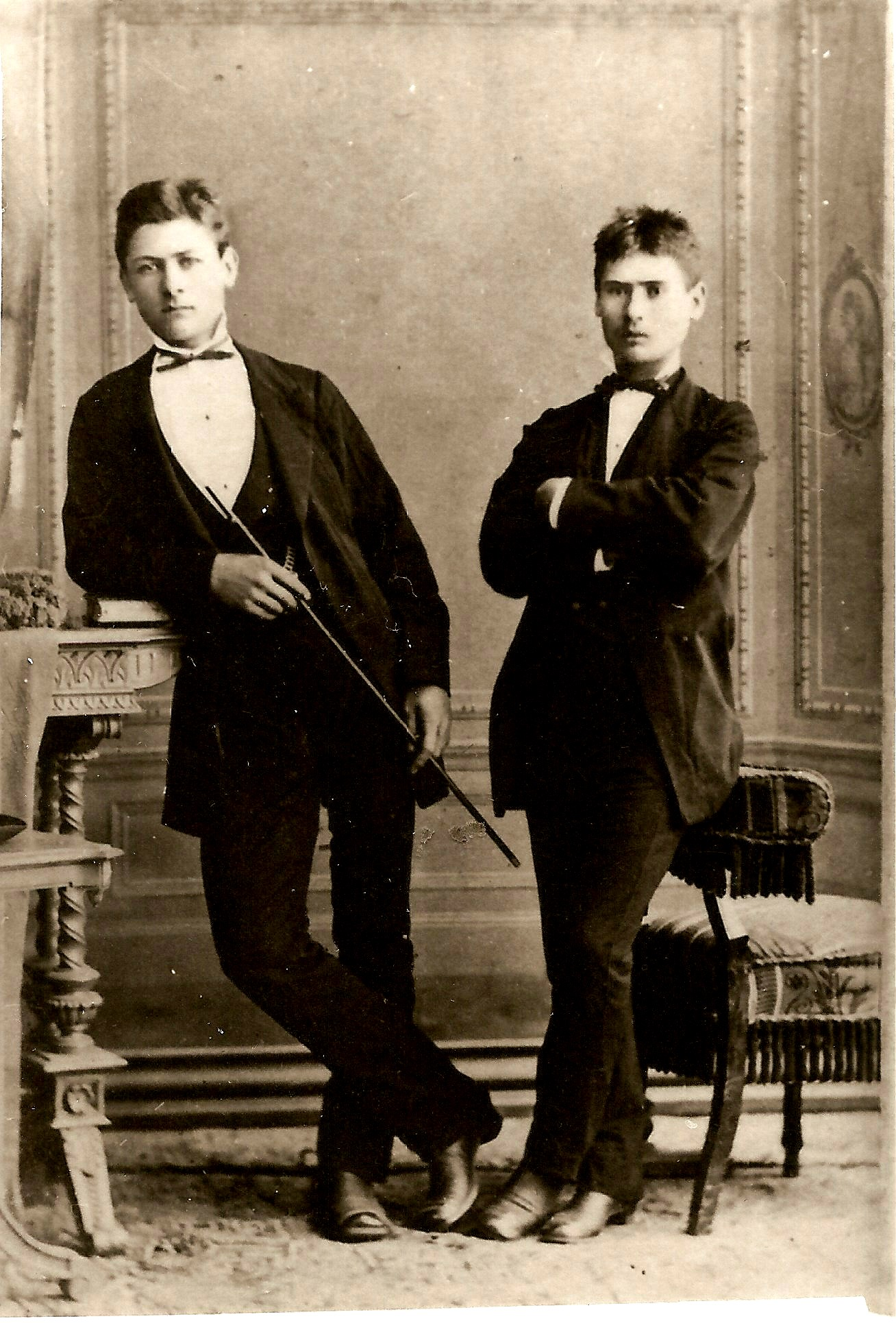 Dionisie și Aurel Florianu în perioada studiilor de la Blaj.